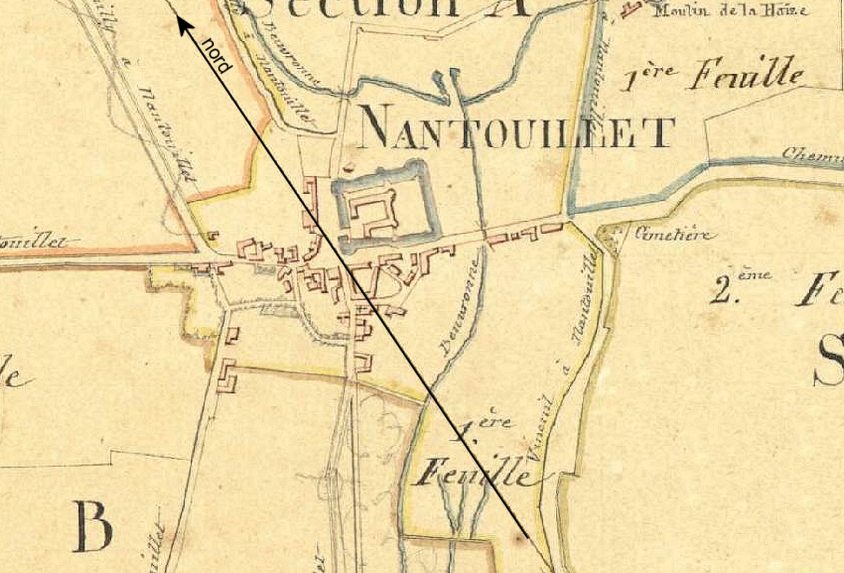 Extrait du plan d'assemblage du cadastre napoléonien pour situer le château.